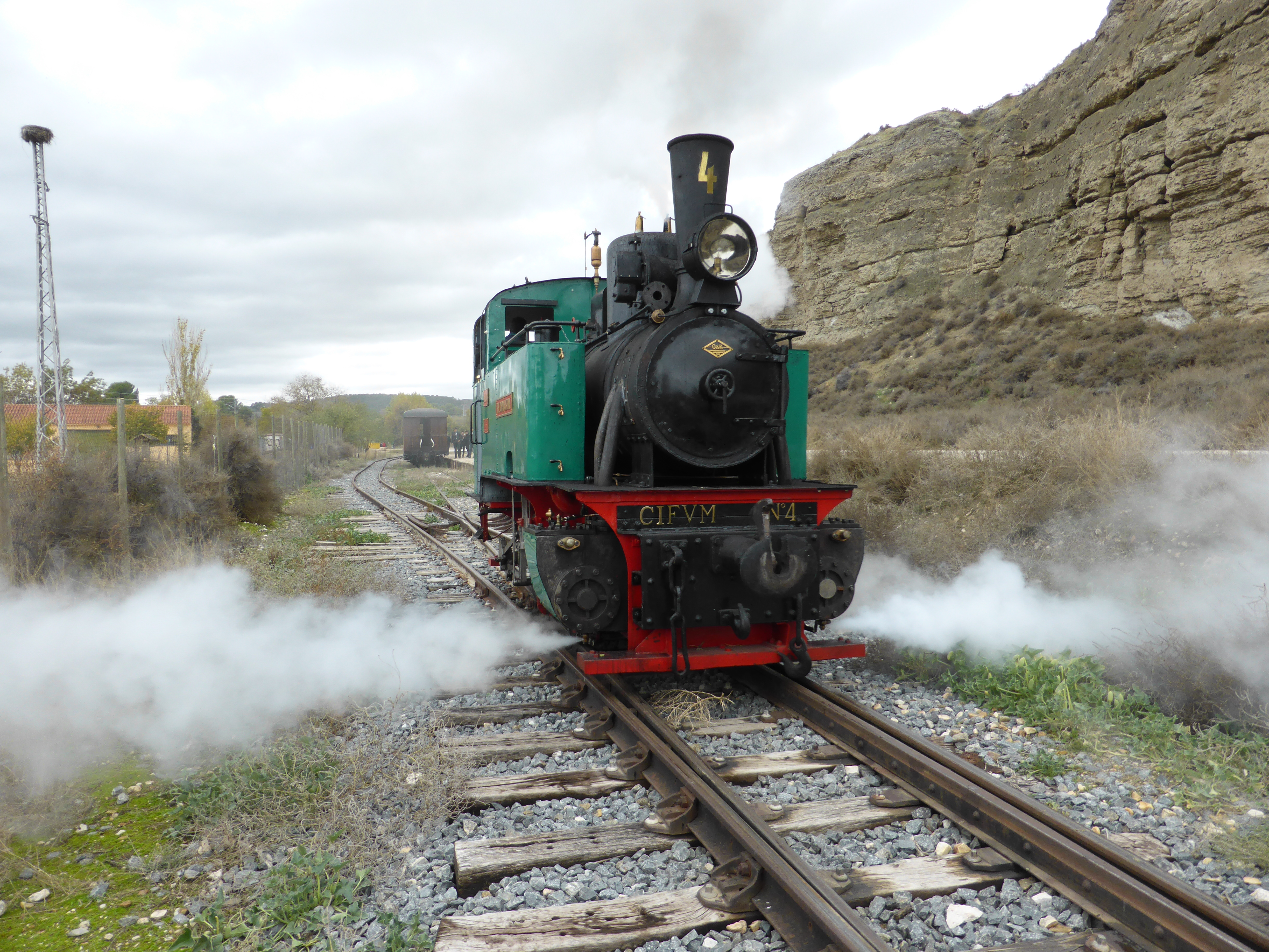 Locomotora de vapor-carbón, fabricada por "Orenstein & Koppel" (O & K) en Alemania, en el año 1926. Vía métrica. Trabajó en Torrelavega (Cantabria). Adquirida por el CIFVM (Vapor-Madrid), acaba de ser restaurada y puesta en funcionamiento en el Tren de Arganda (en la provincia de Madrid, España). La fotografía está tomada en su primer día de servicio, maniobrando en el apeadero de la Laguna del Campillo, municipio de Rivas-Vaciamadrid.